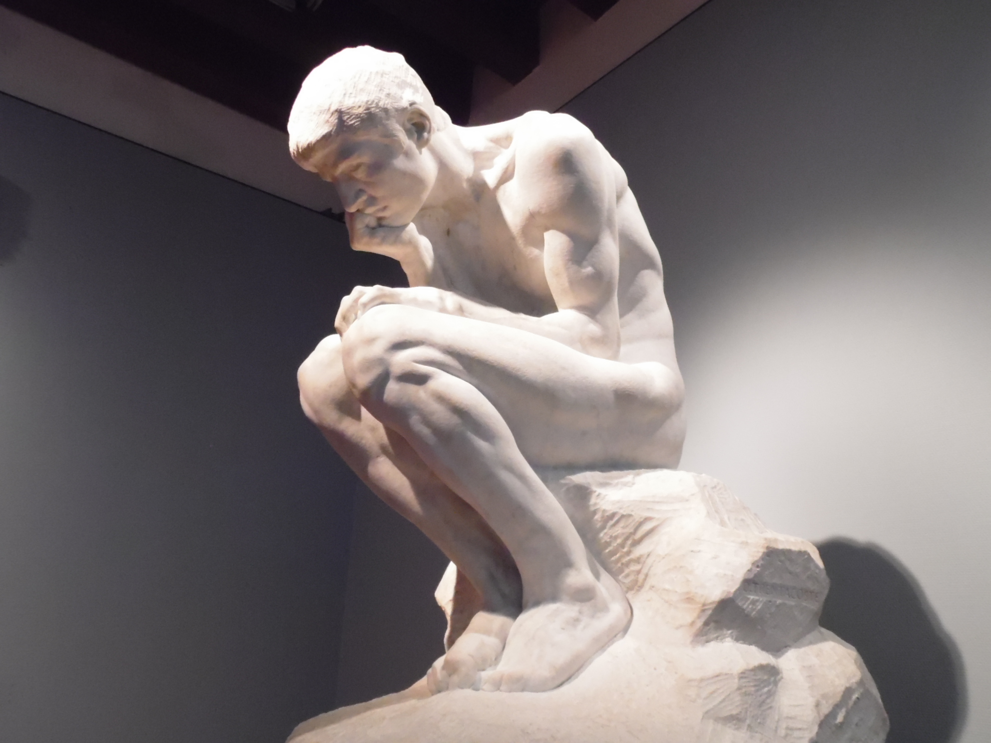 Domenico Trentacoste (Palermo 1859 - Florence 1933): Caino (post 1903). Galleria d’Arte Moderna (Palermo)